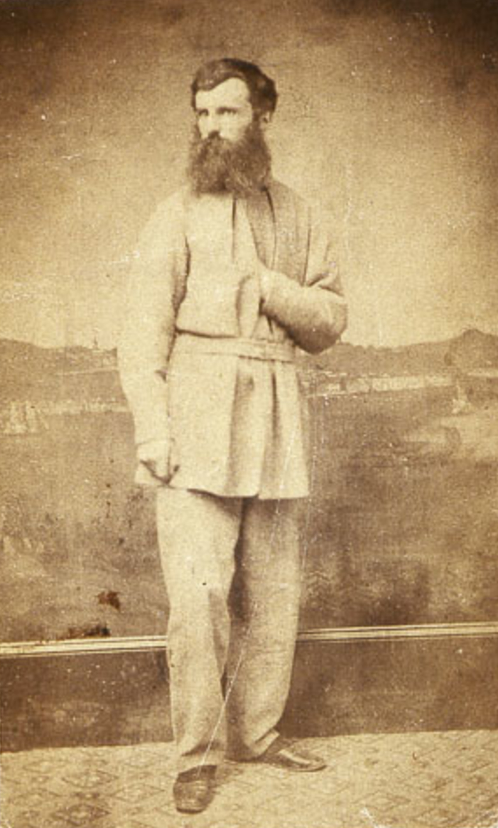 Portrait du sculpteur sur bois Jean-Baptiste Côté (1832-1907), vers 1865. Épreuve à l'albumine argentique. Dimensions : 10,1 x 6,1 cm (carte); 9 x 5,5 cm (image). Don de Jeannine Côté.